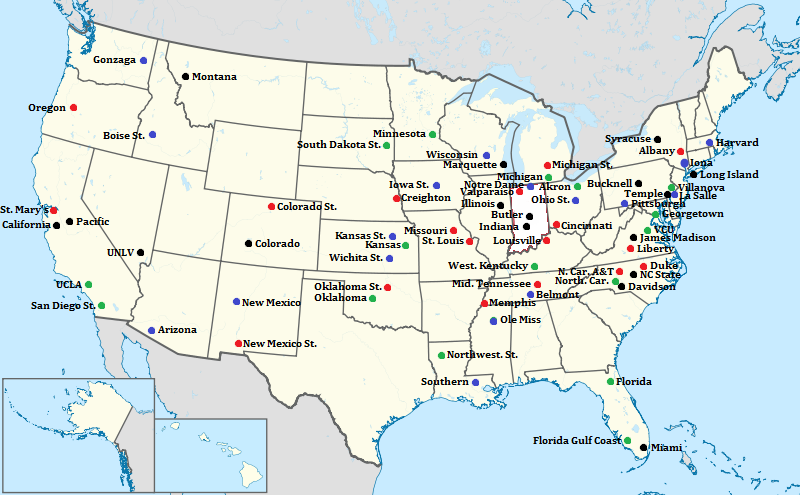 Squadre partecipanti al torneo di pallacanestro della NCAA Division I - 2013